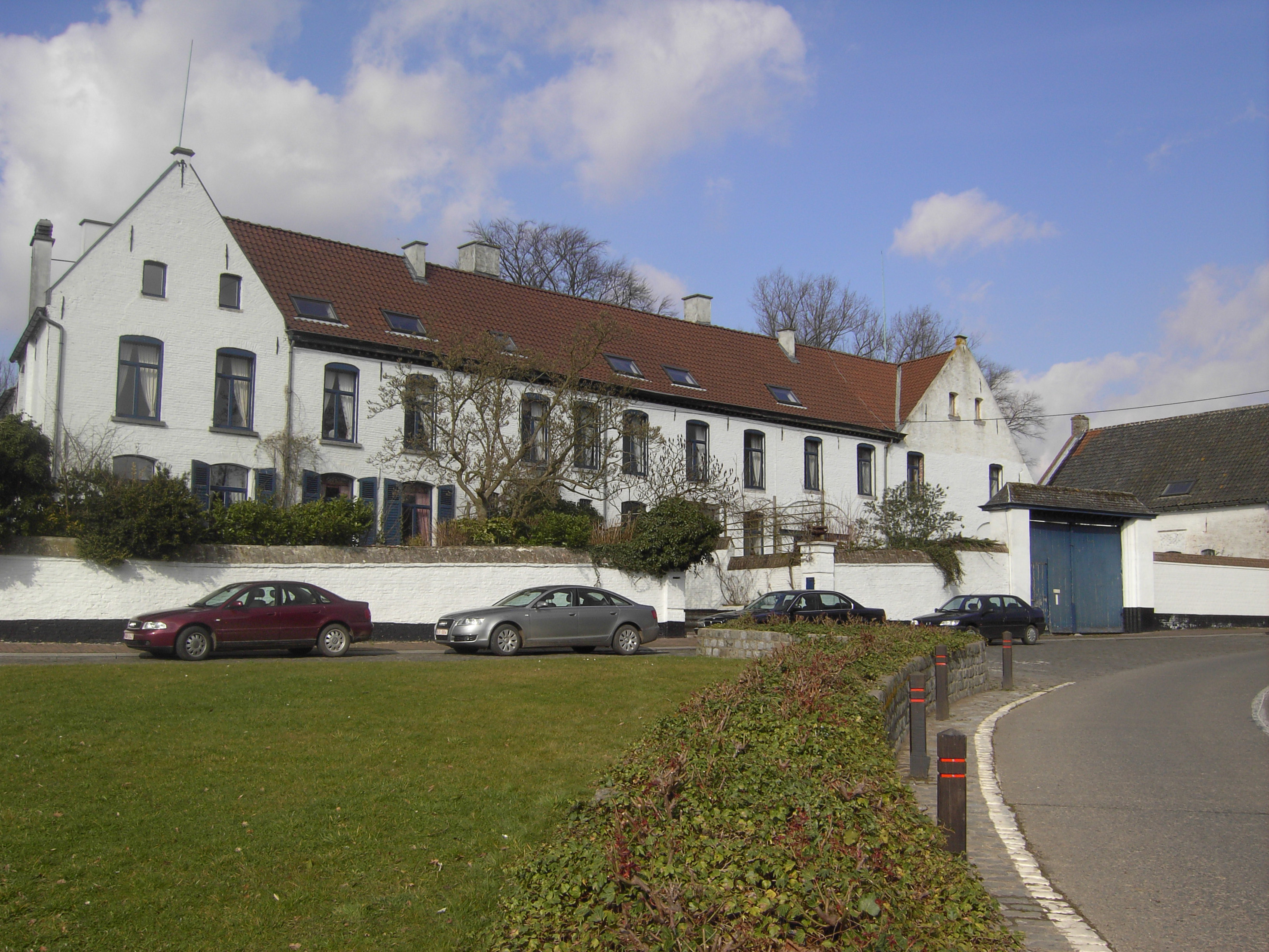 Hof ter Elzen - Kastanjestraat - Goeferdinge - Geraardsbergen - Oost-Vlaanden - België